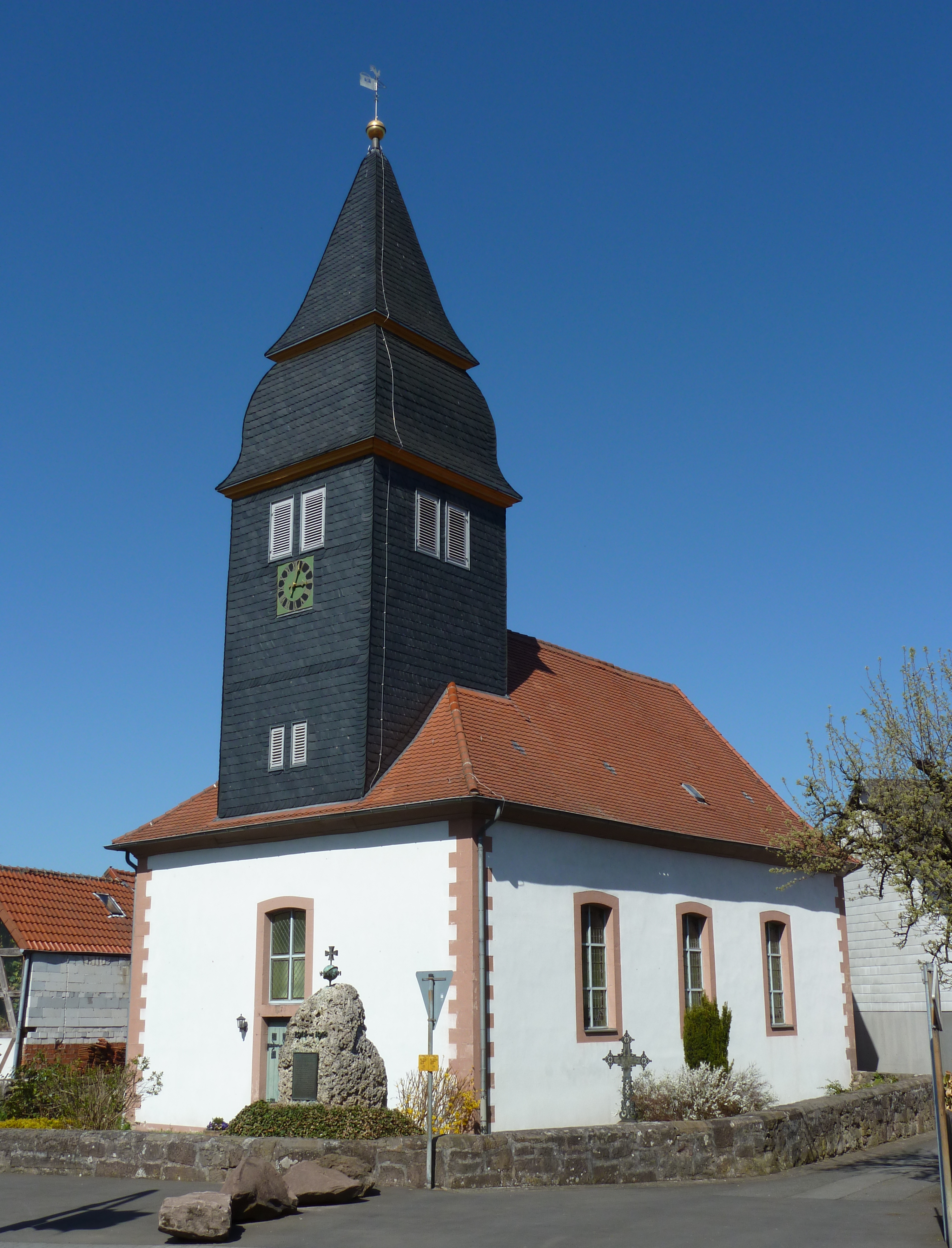 Ev. Kirche in Wendershausen, Stadt Witzenhausen, Nordhessen